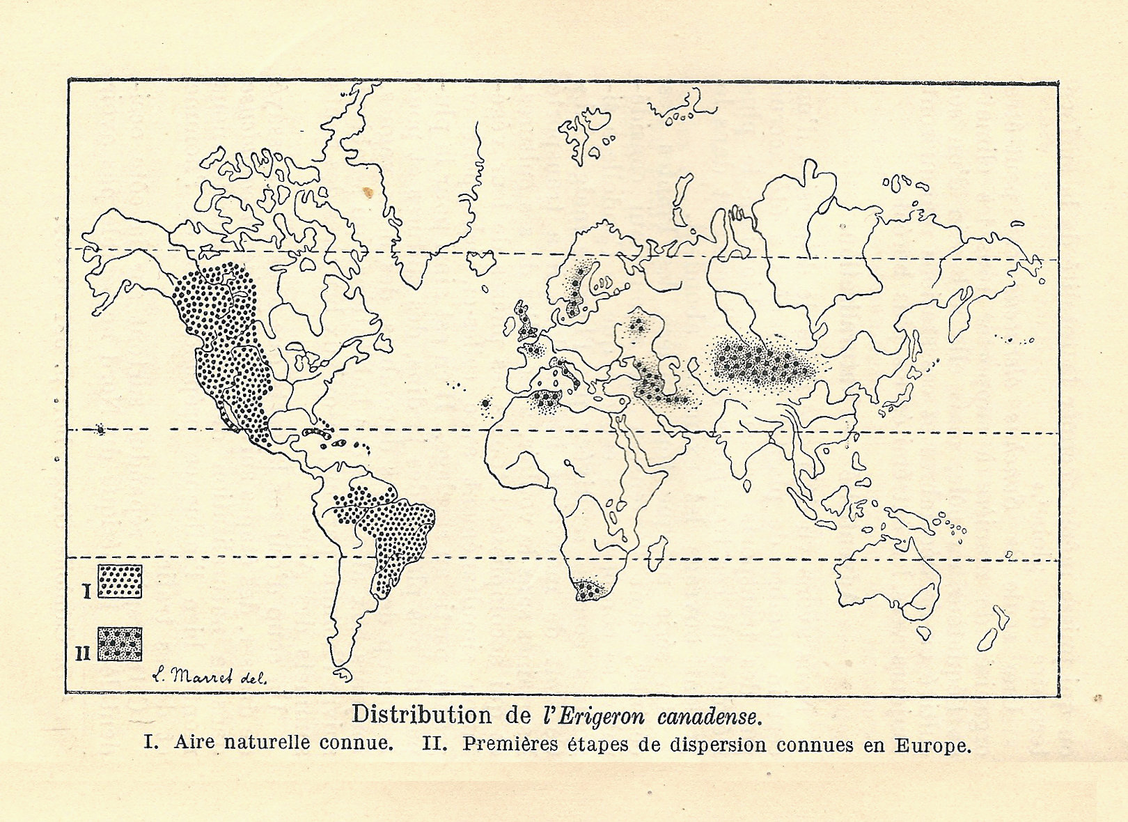 Aire de répartition de l’Érigéron du Canada, au début du XXe siècle.